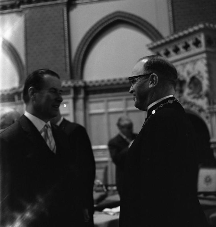 10 jähriges Bestehen des BGS: Empfang des Innenministers (Schröder) im Rathaussaal Lübeck